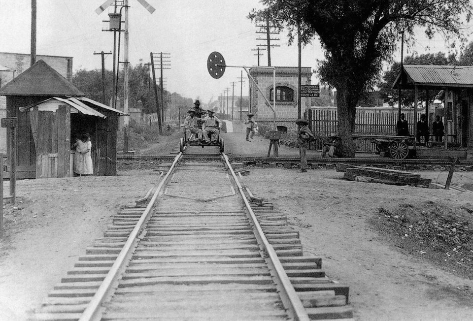 Marina Nacional at Ferrocarril a Cuernavaca, now Nuevo Polanco, Mexico City